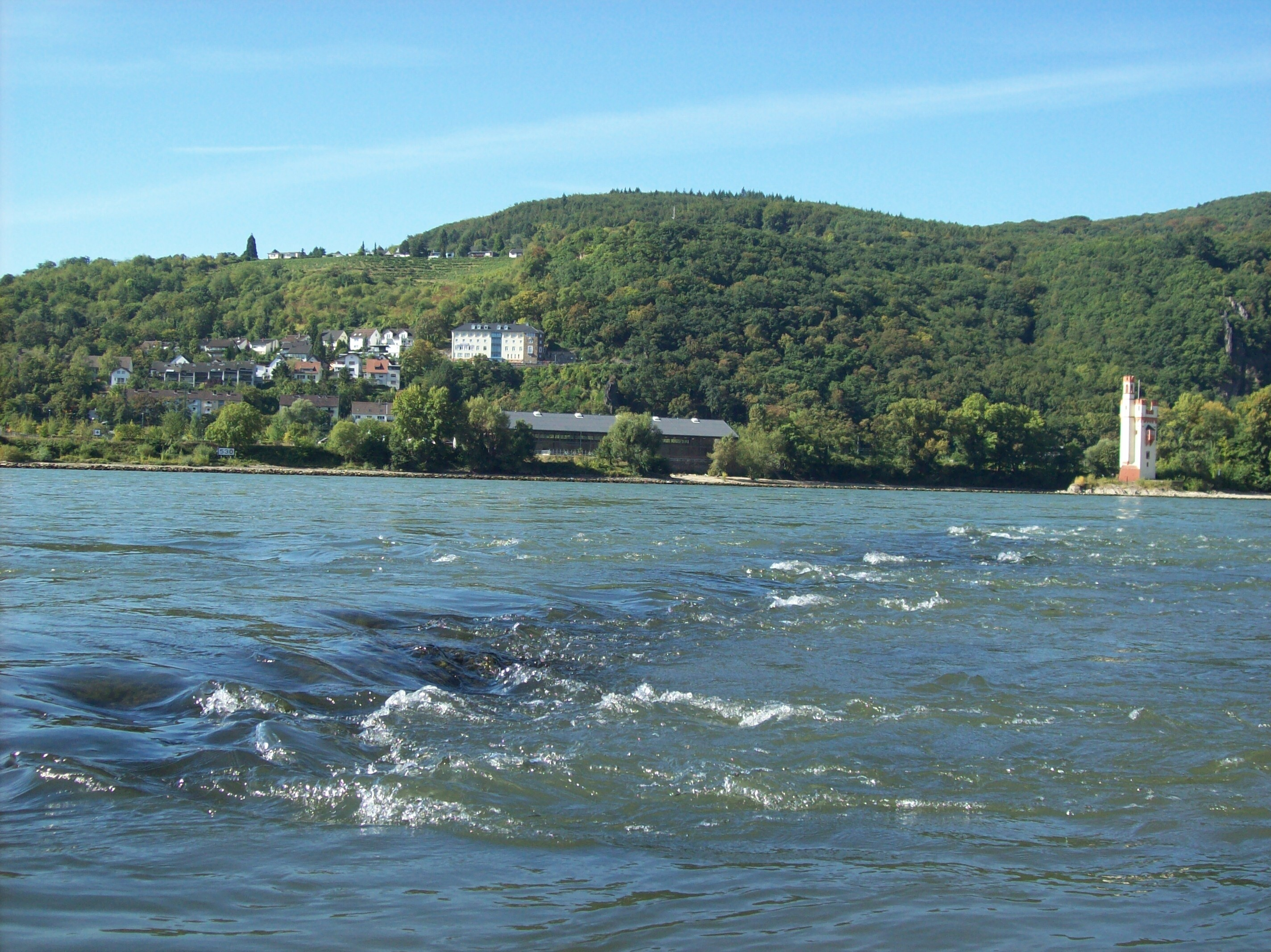 Fiddel. Untiefe des Rheins bei Bingen am rechten Rheinufer. Stromkilometer ca. 530. Pegel Kaub etwa 135. Die Fiddel ist zur Zeit der Aufnahme knapp vom Wasser überspült. Im Hintergrund der Mäuseturm.